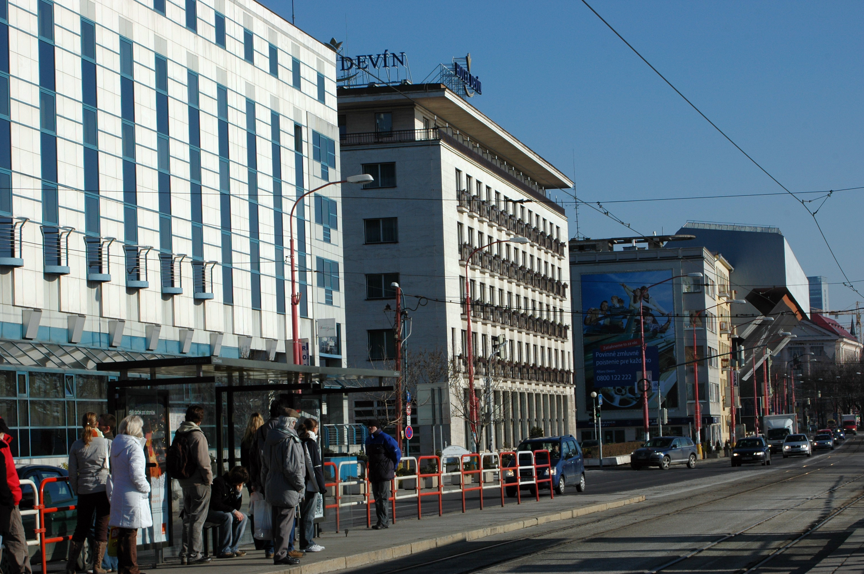 hotel devin bratislava bellus